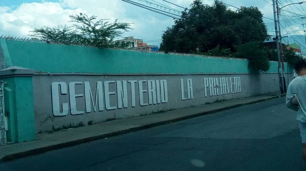 cementerio la primavera